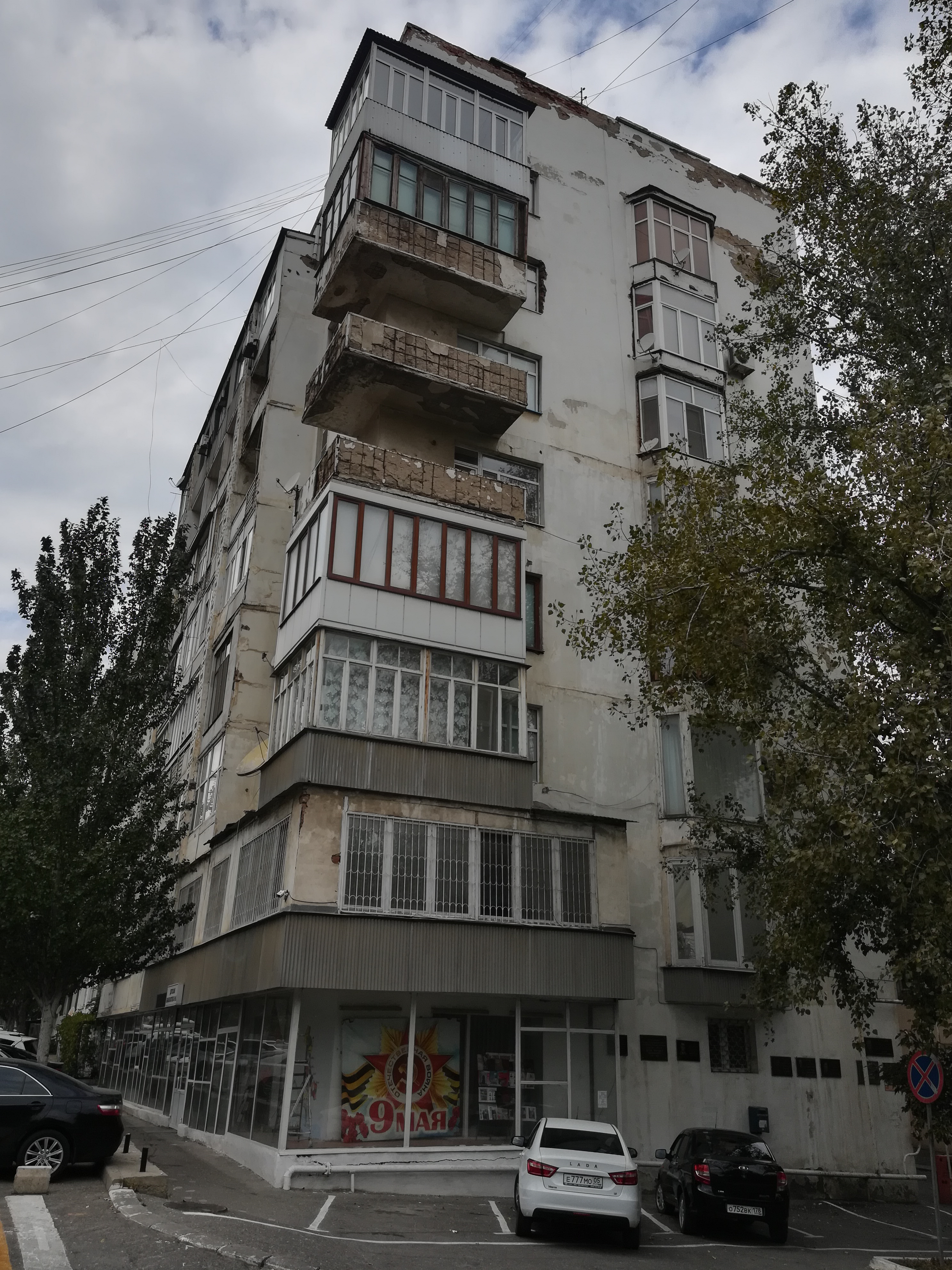 Махачкала